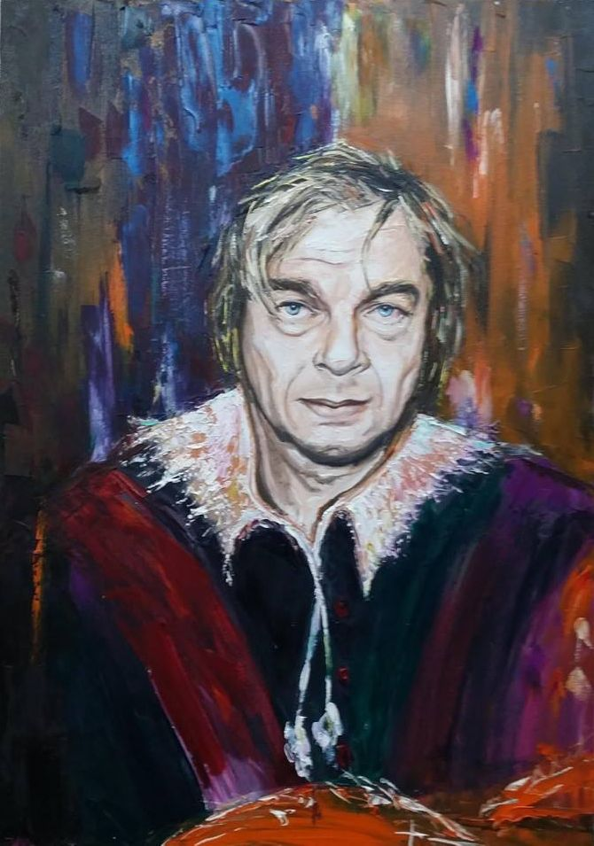 Nichita Stanescu, portret realizat de Paul Mecet